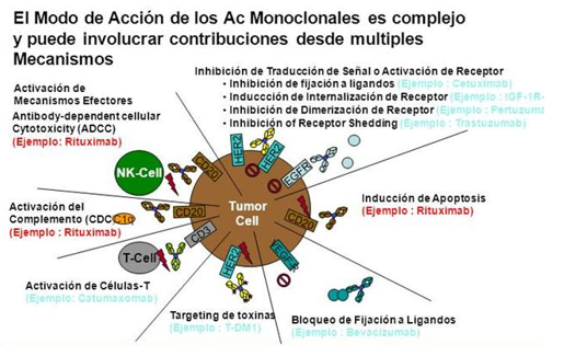 Mecanismo de acción y de actuación de los MoAbs.